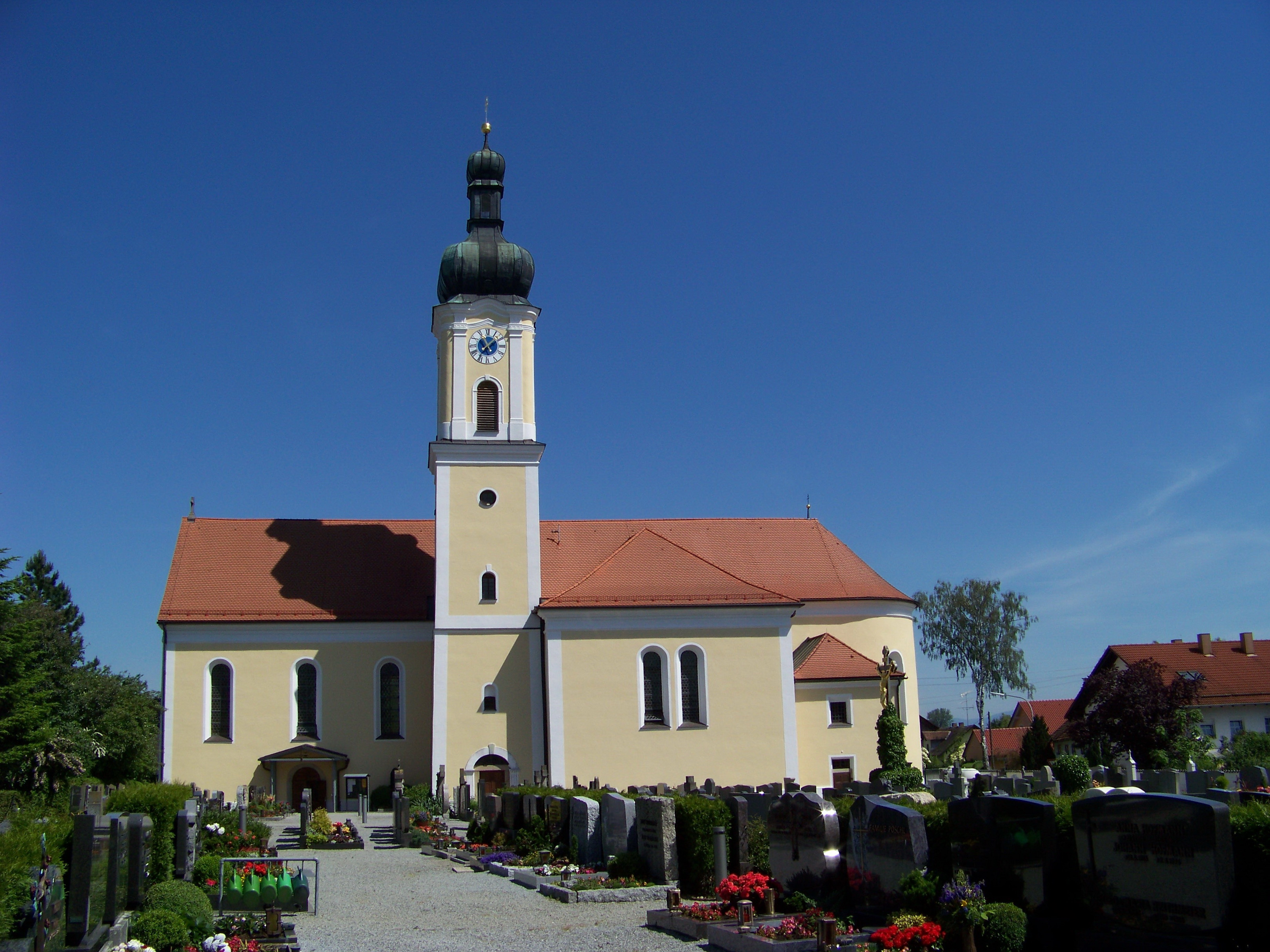 Oberschneiding, Katholische Pfarrkirche Mariae Himmelfahrt, Altarhaus, Vierung und Turm 18.Jahrhundert, Langhauserweiterung nach Westen und zwei Querhäuser 1848, 1910-14 Umgestaltung wohl durch Heinrich Hauberrisser; mit Ausstattung.